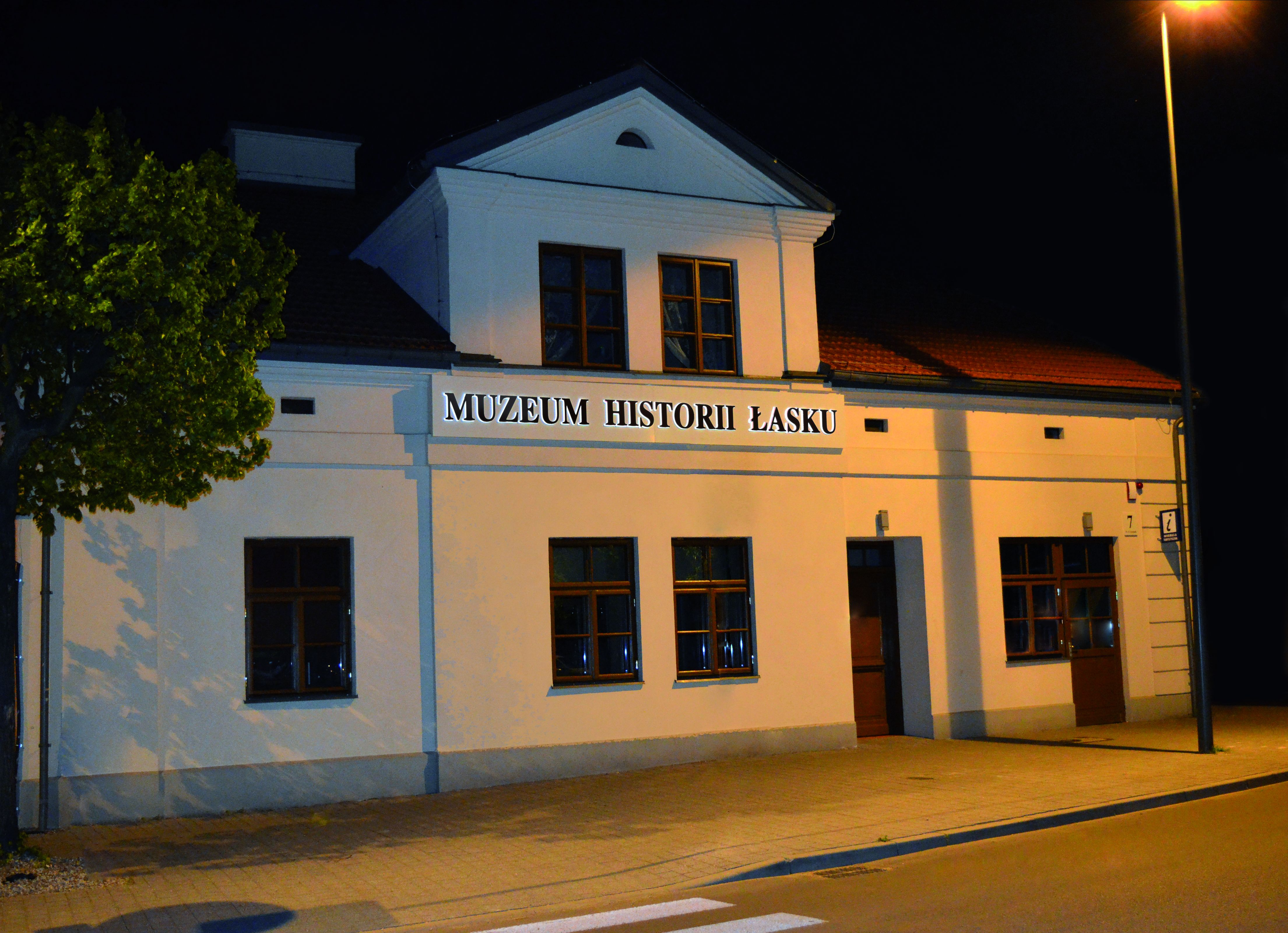 Muzeum Historii Łasku, front budynku.